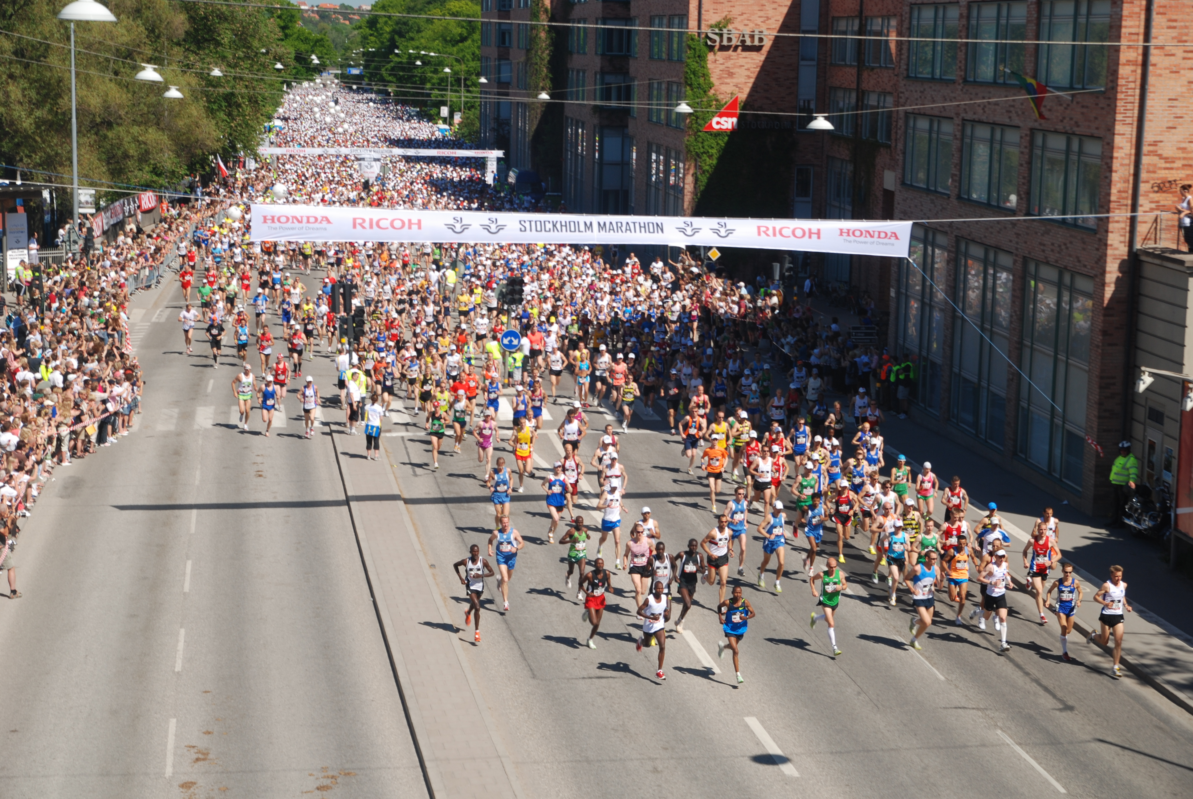 Start des Stockholmmarathons 2009